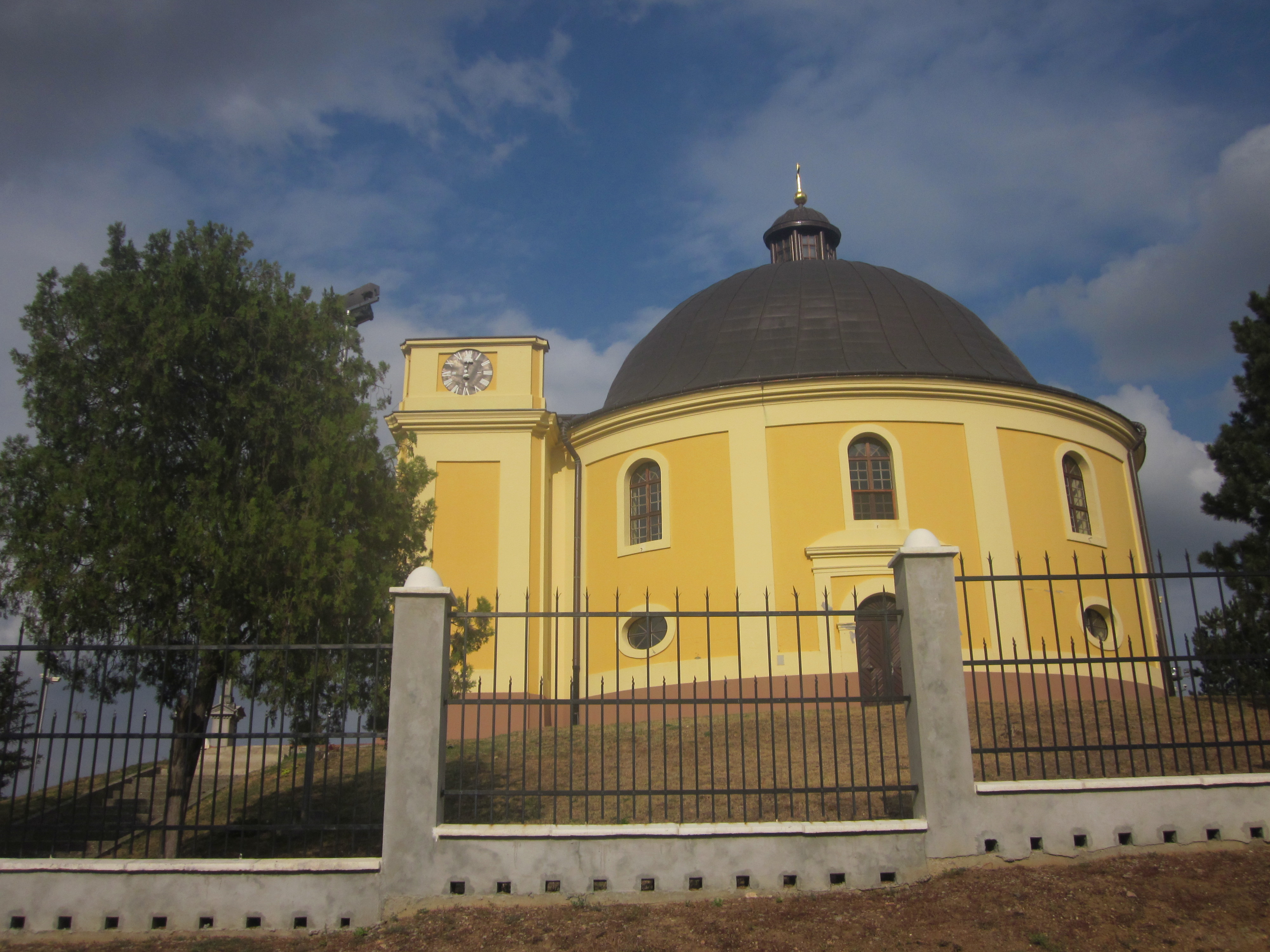 Kapela mira,mesto zakljucivanja karlovackog mira